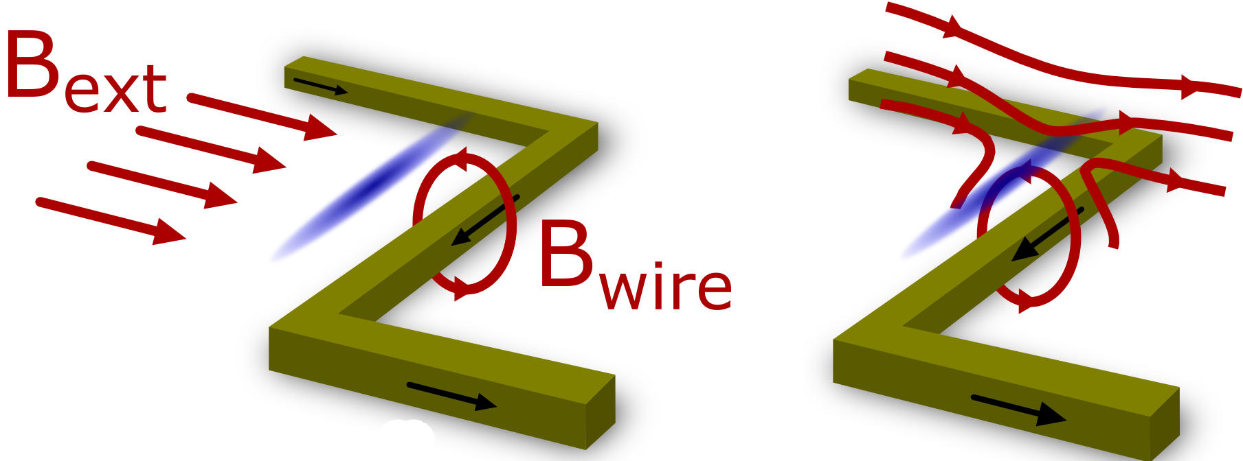 Funktionsprinzip einer magnetischen Mikrofalle